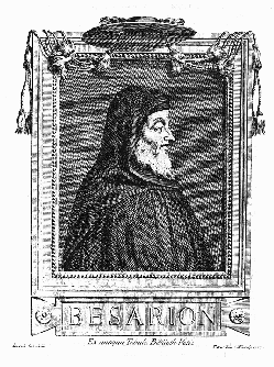 Basilius Bessarion (1403-1472)